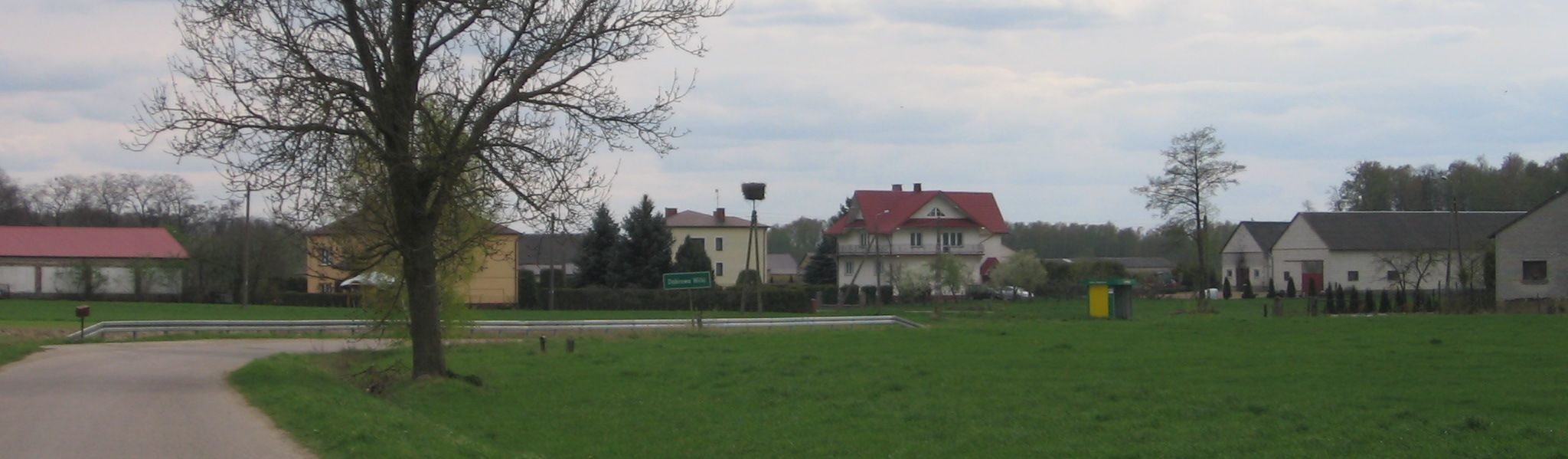 Wschodnia panorama wsi